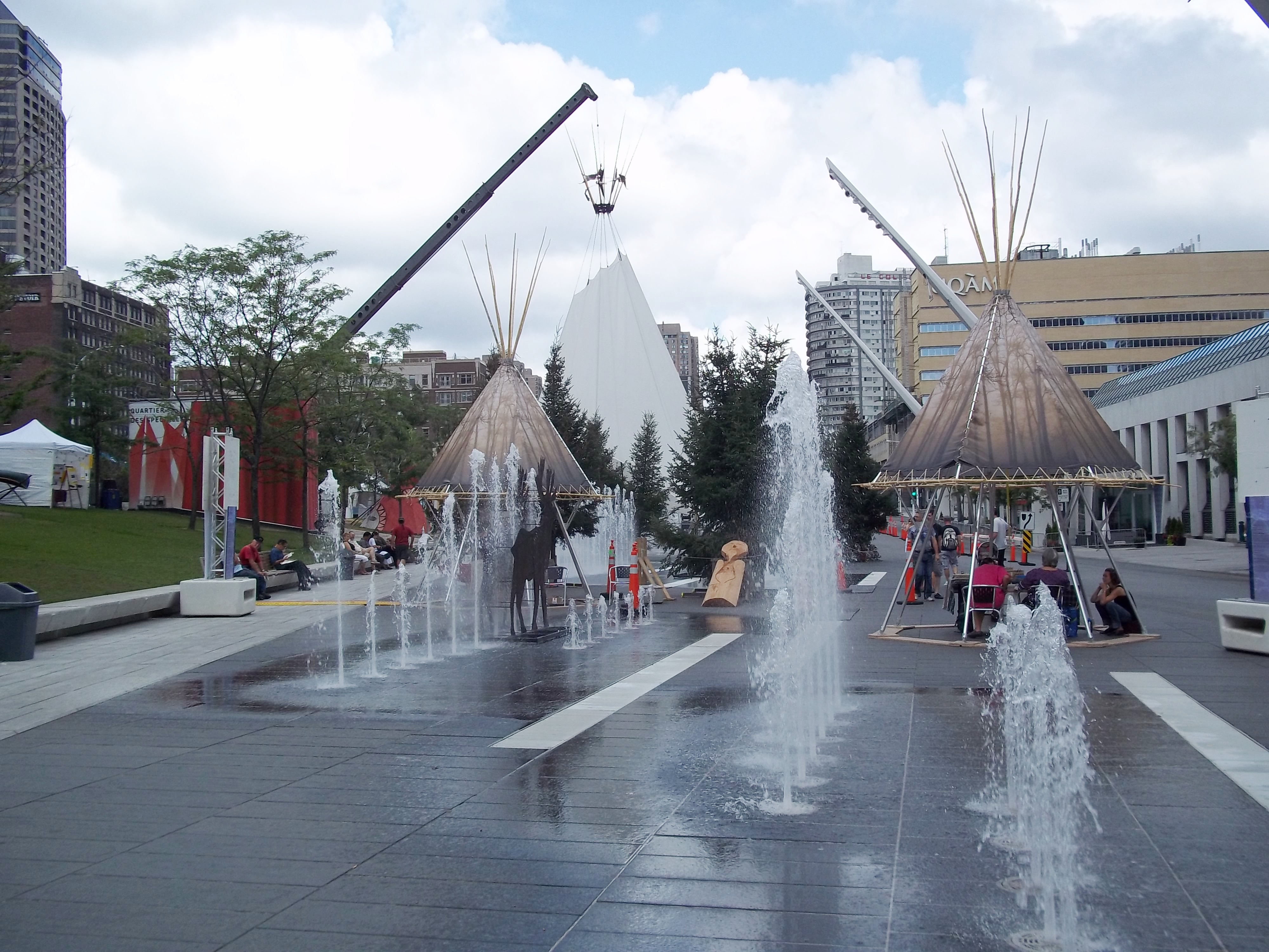 Aménagement de la Place des Festival lors de l'événement annuel Présence autochtone, à Montréal